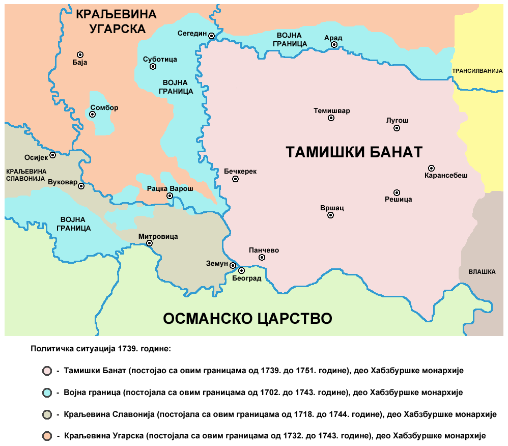 Мap of the Banat of Temeswar and Military Frontier in 1739. Мапа Тамишког Баната и војне границе 1739. године.